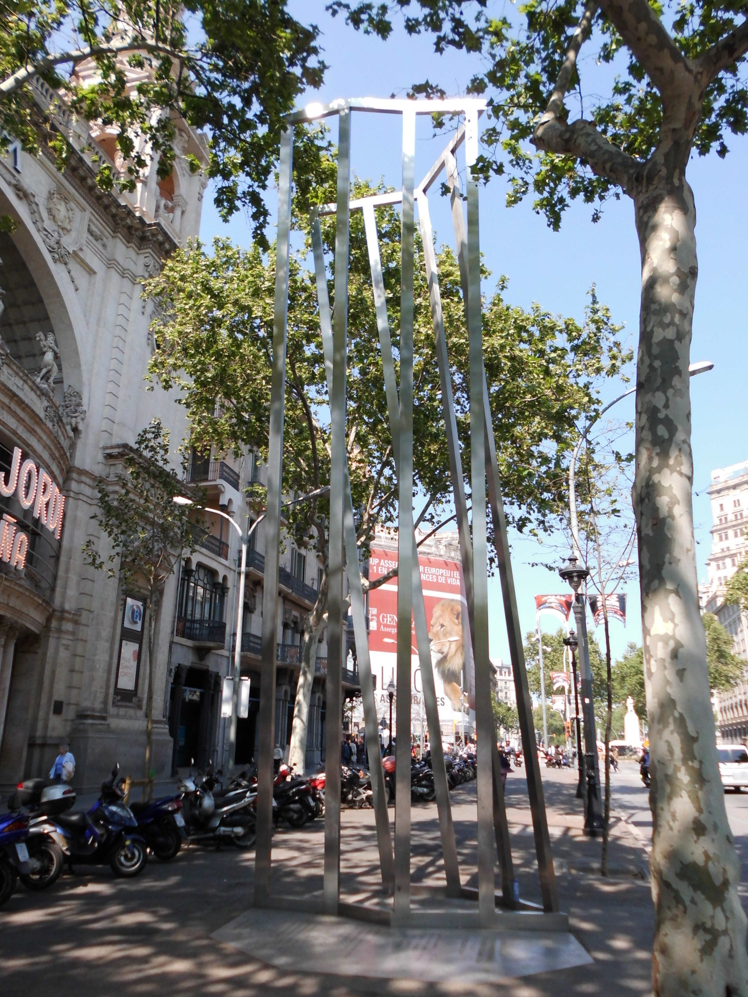 Encaix (Margarita Andreu). Gran Via de les Corts Catalanes, 581 (Barcelona)